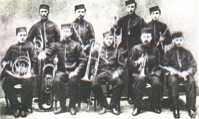 Hubertus Kilian (vorne in der Mitte mit Posaune) mit seiner Kapelle (Partie) in Shanghai.